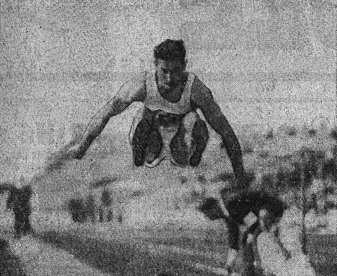 Wilhelm Leichum vainqueur du saut en longueur aux championnats d'Europe 1938.